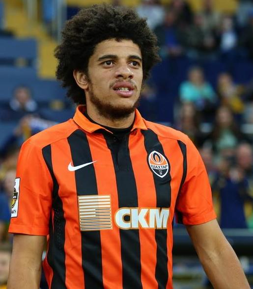 Тайсон під час виступів за Шахтар